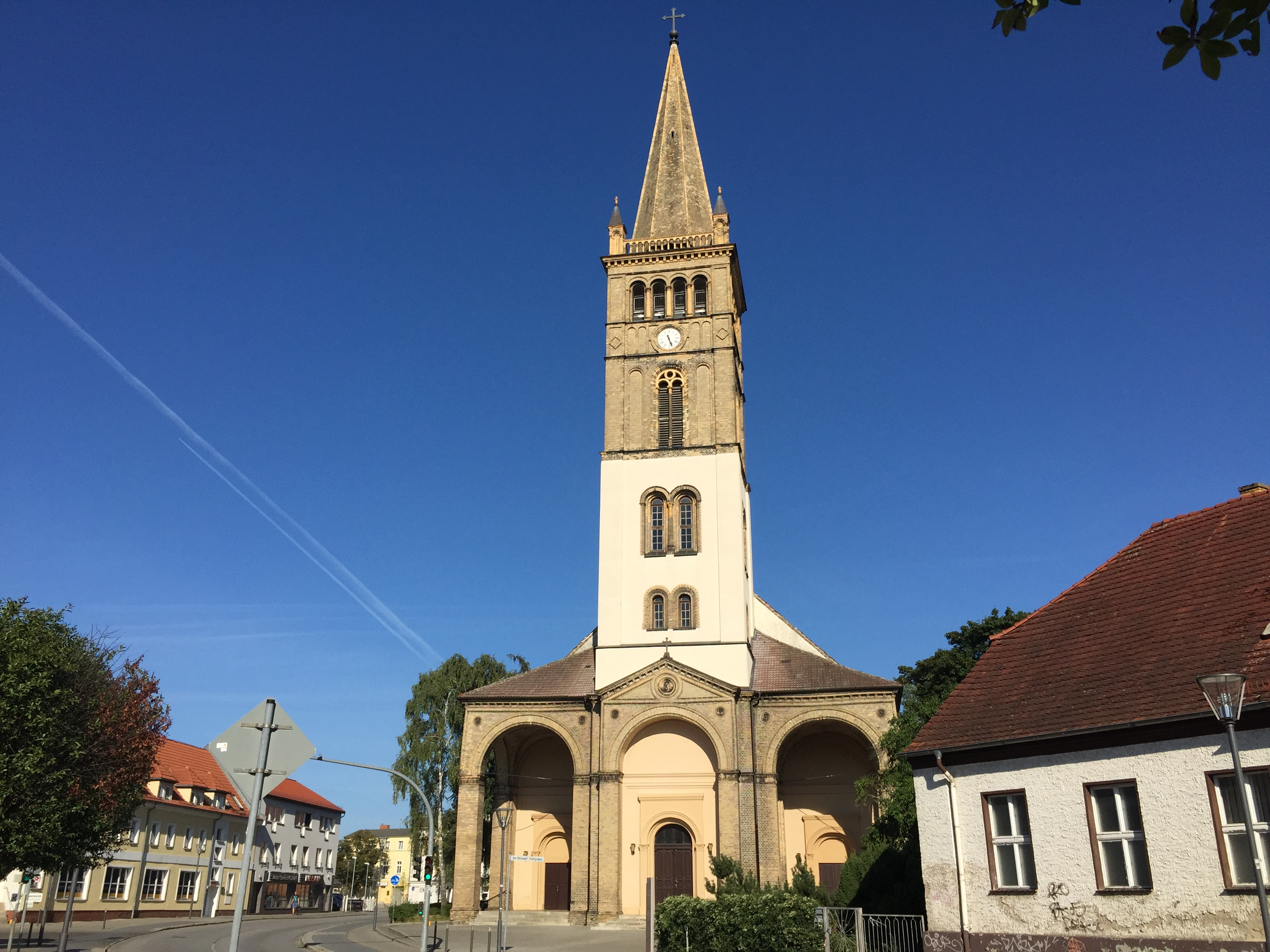 St. Nicolai Kirche Oranieburg